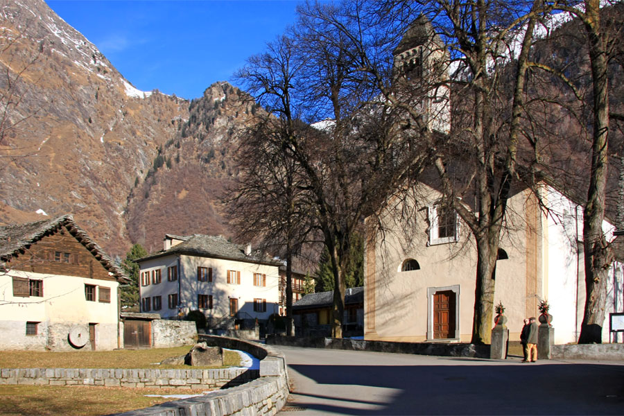 Scorcio di Olivone, Blenio (CH-TI)